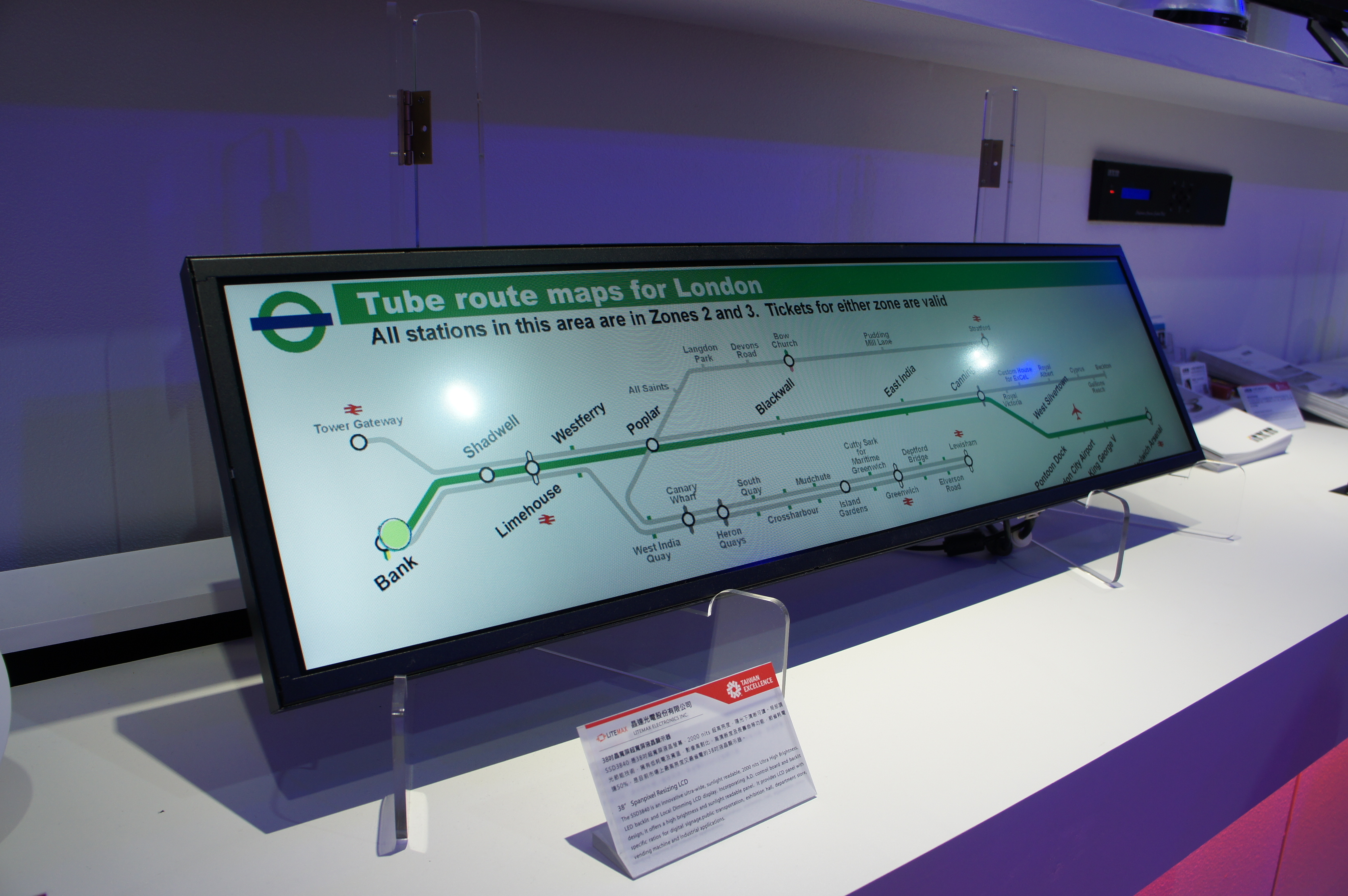 2014台北國際電腦展，晶達光電38吋超寬屏液晶顯示器SSD3840。